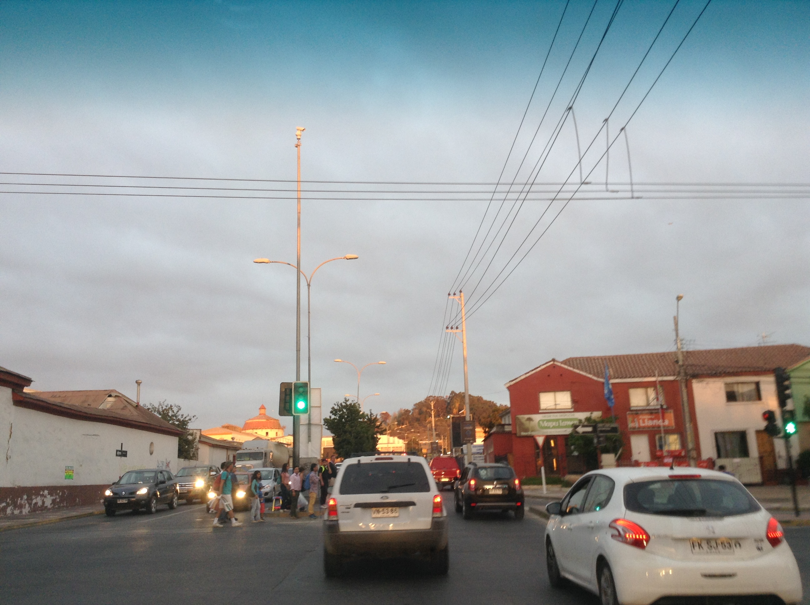 Avenida Amunategui, La Serena, Chile